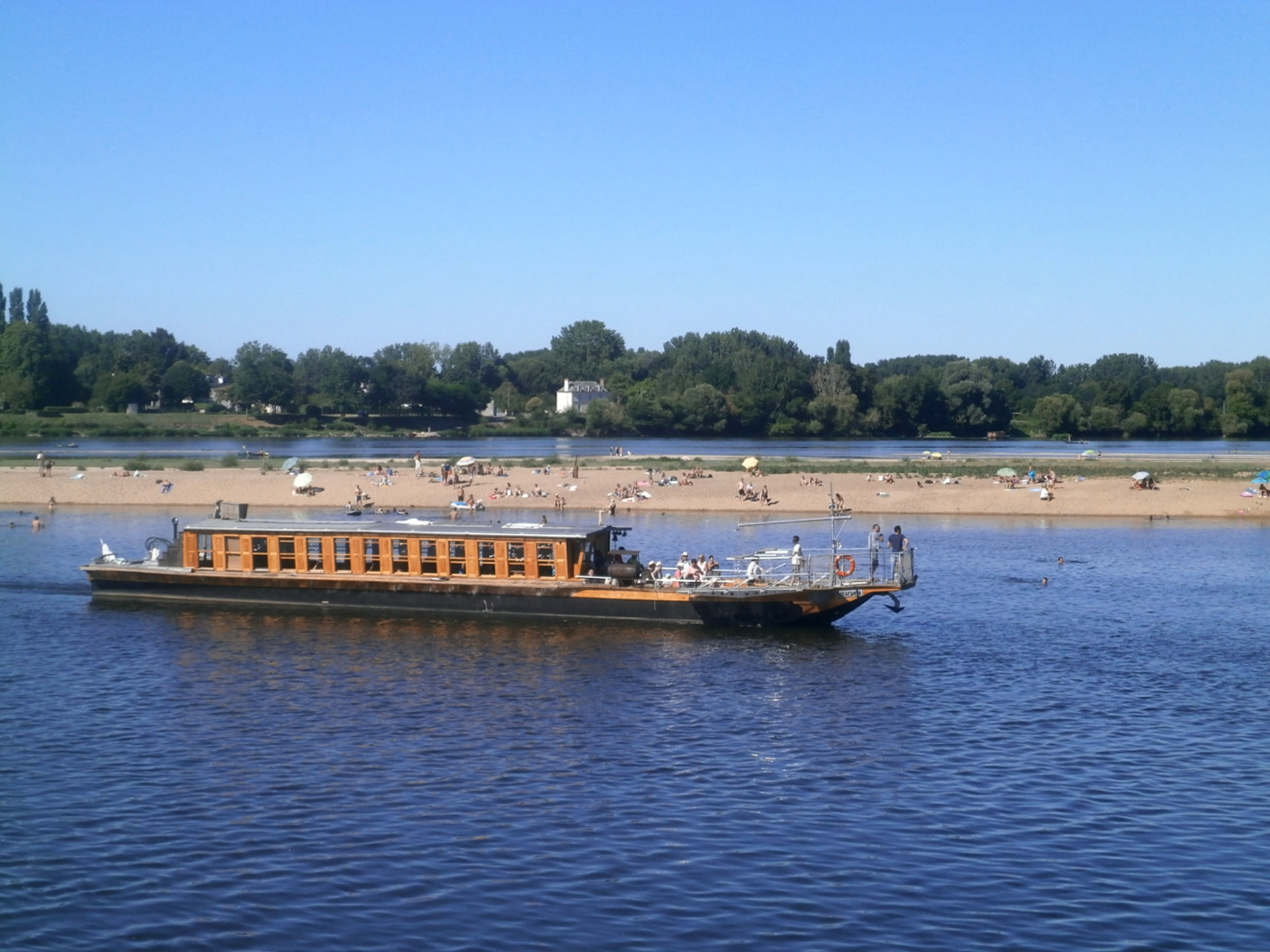 Activités touristiques (baignade et promenades en bateau) à Candes-Saint-Martin